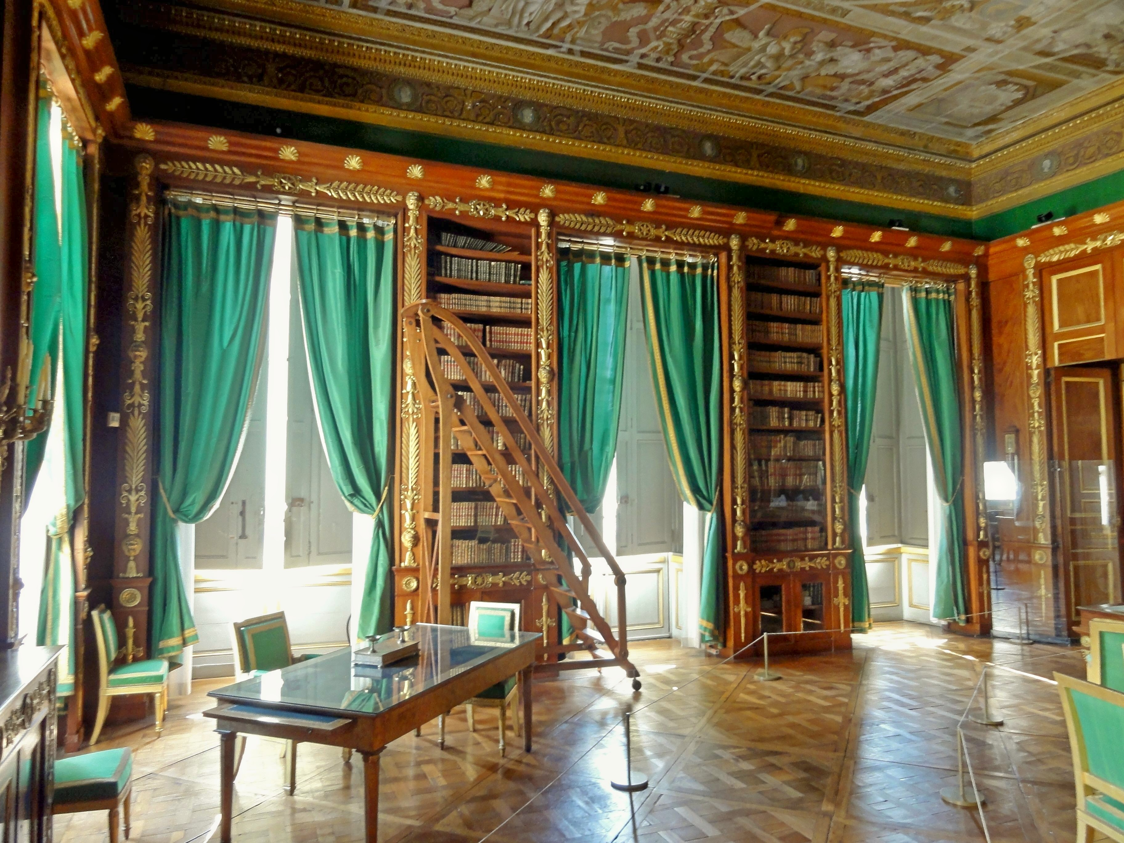 Bibliothèque de l'Empereur (Premier Empire).